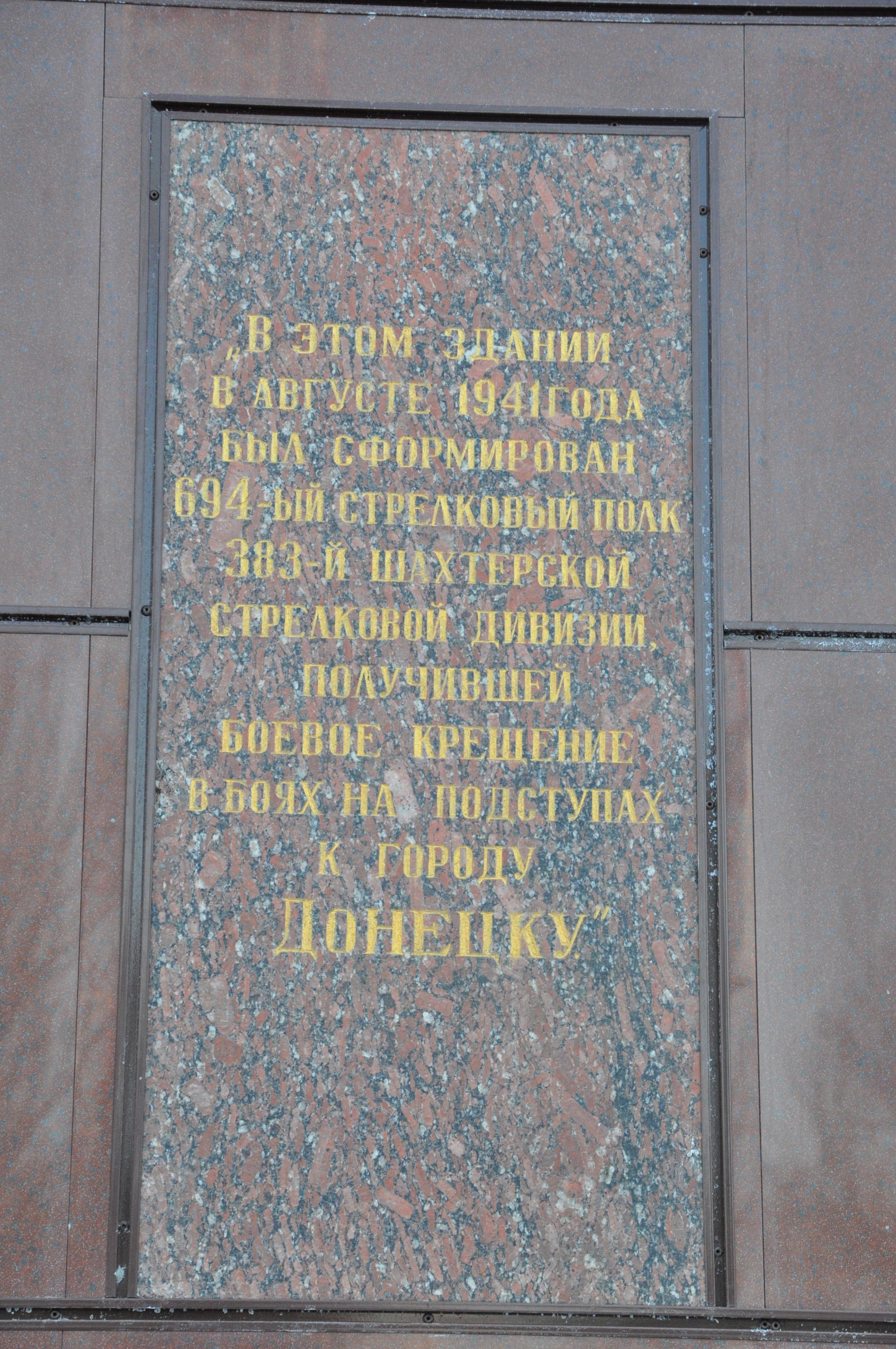 Донецк. ДК металлургов.